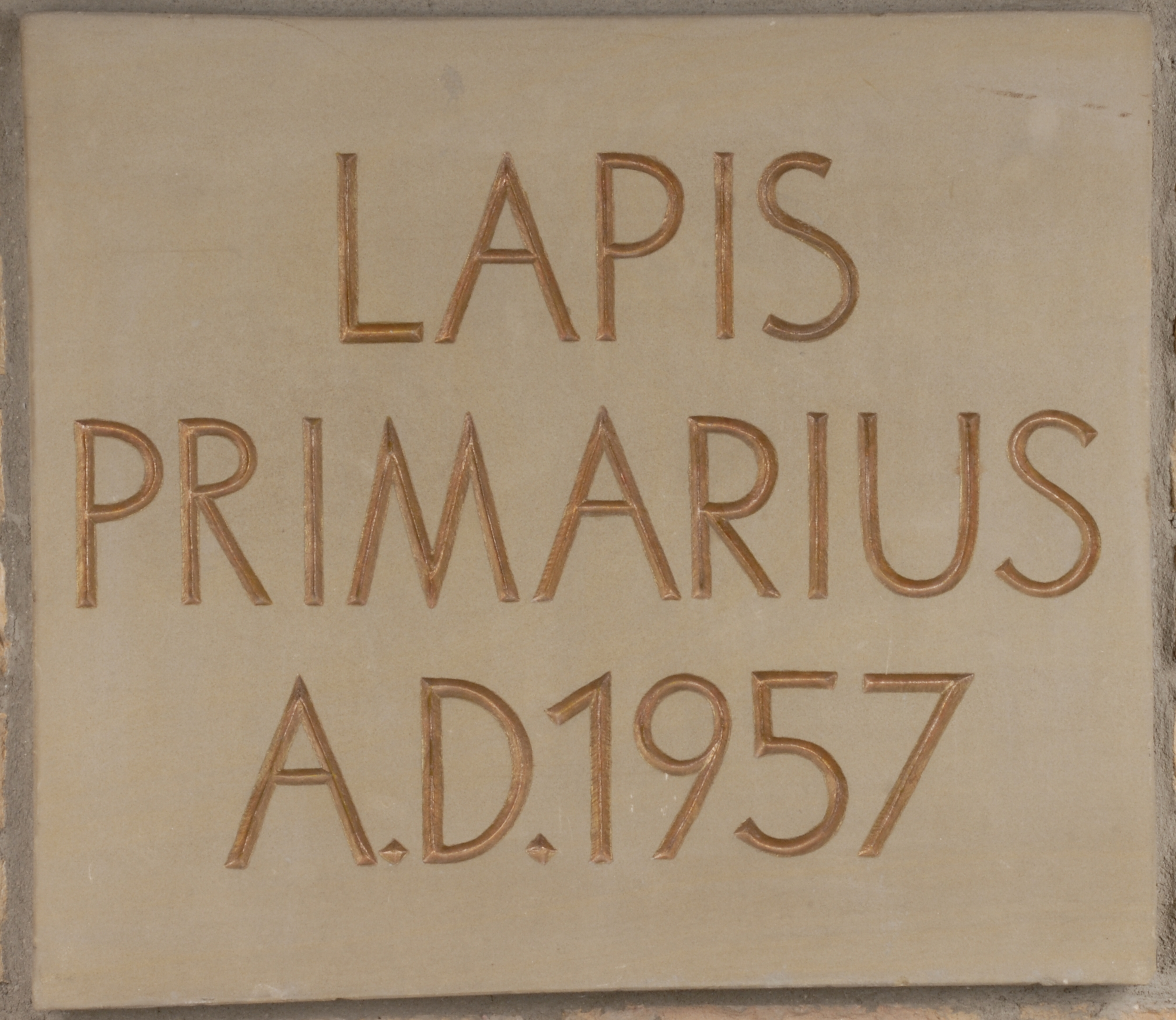 Grundstein der Kirche, die noch 2019 Bestand hatte